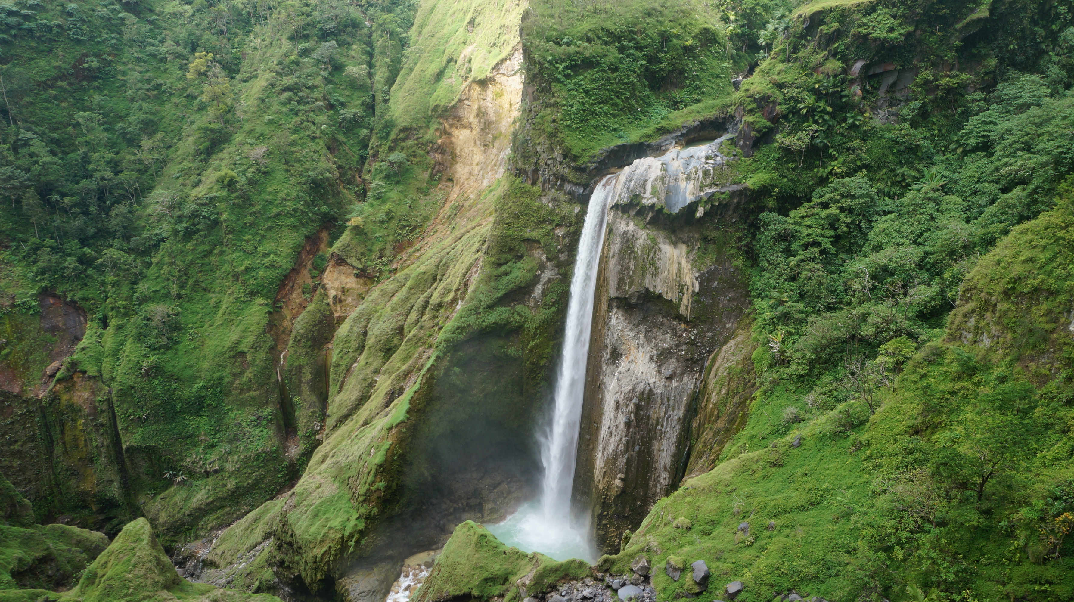 air terjun yang berada di gunung rinjani melalui jalur tradisional torean merupakan ikon jalur ini